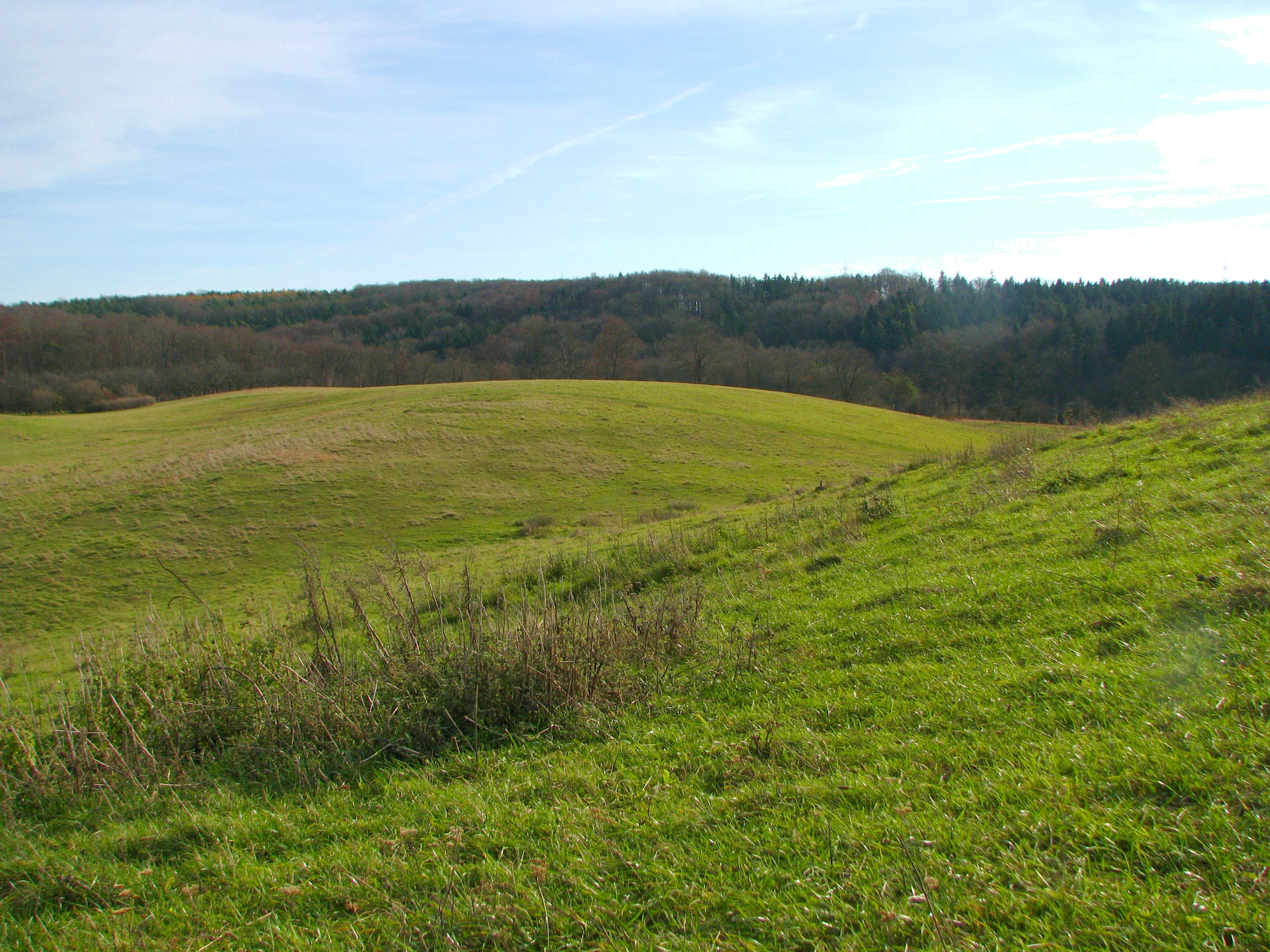 Karstlandschaft am Sender Weimar bei Schloss Belvedere.